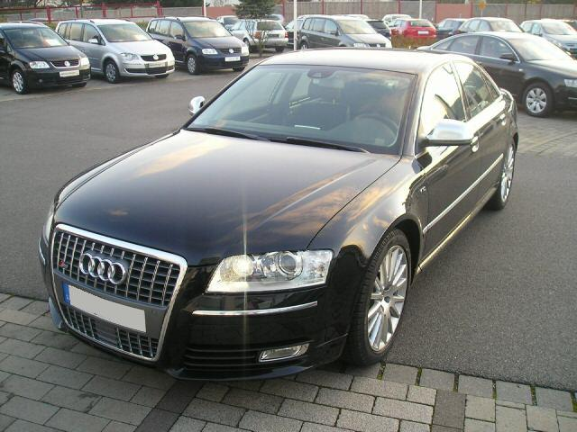 Audi S8